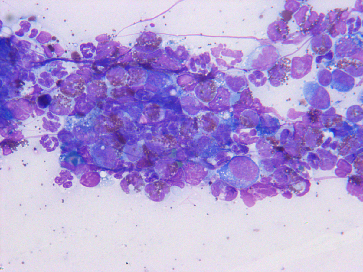 FNA koera kõhu ventraalosas olevatest muutustest. Materjal kogutud 2006 suvi Värving MMG Preparaadis näha eosinofiilid põletiku foonil. Preparaat: Joel Vesmes